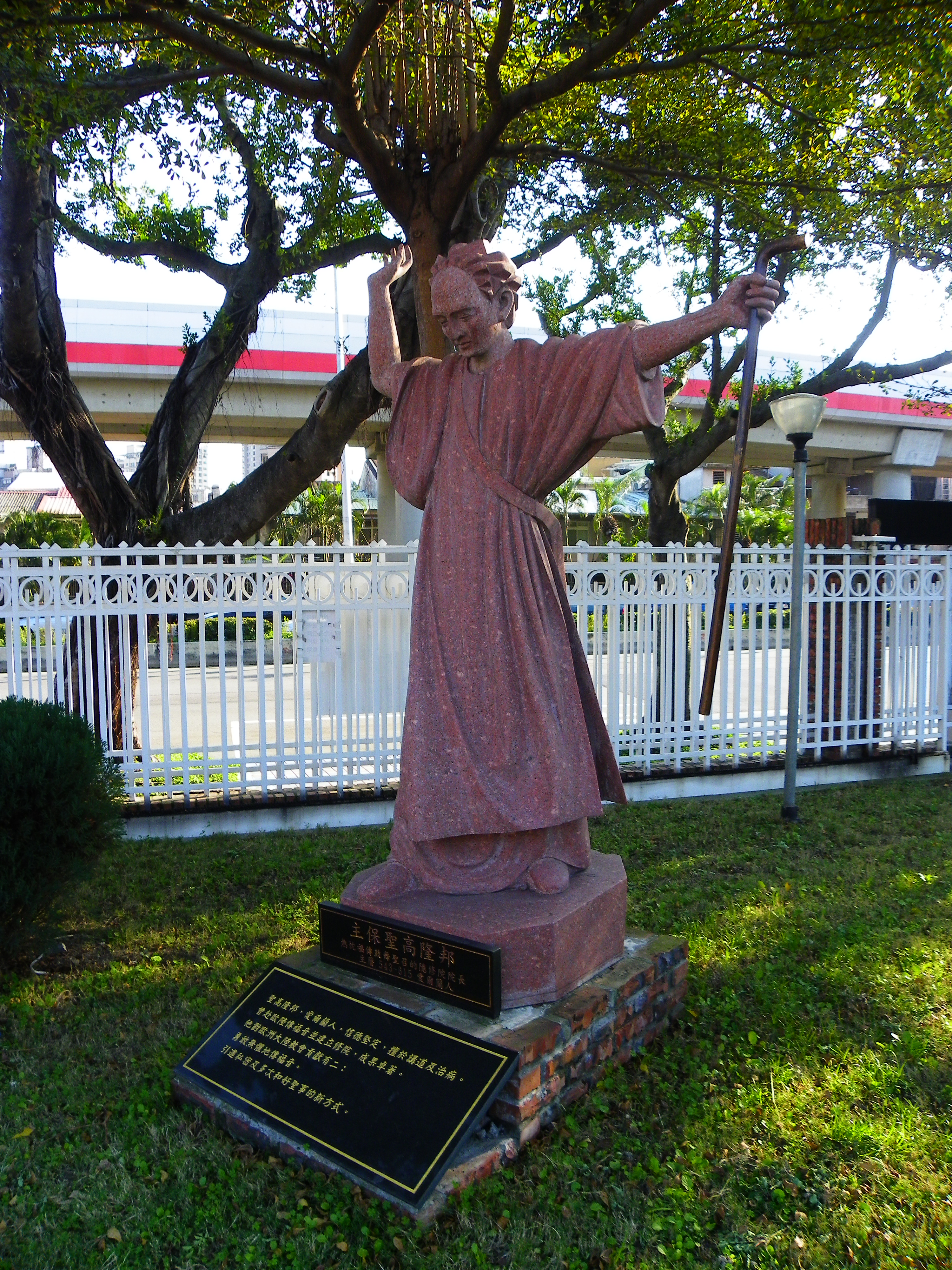 臺灣臺北市北投區聖高隆邦天主堂庭園入口側的聖高隆邦像。